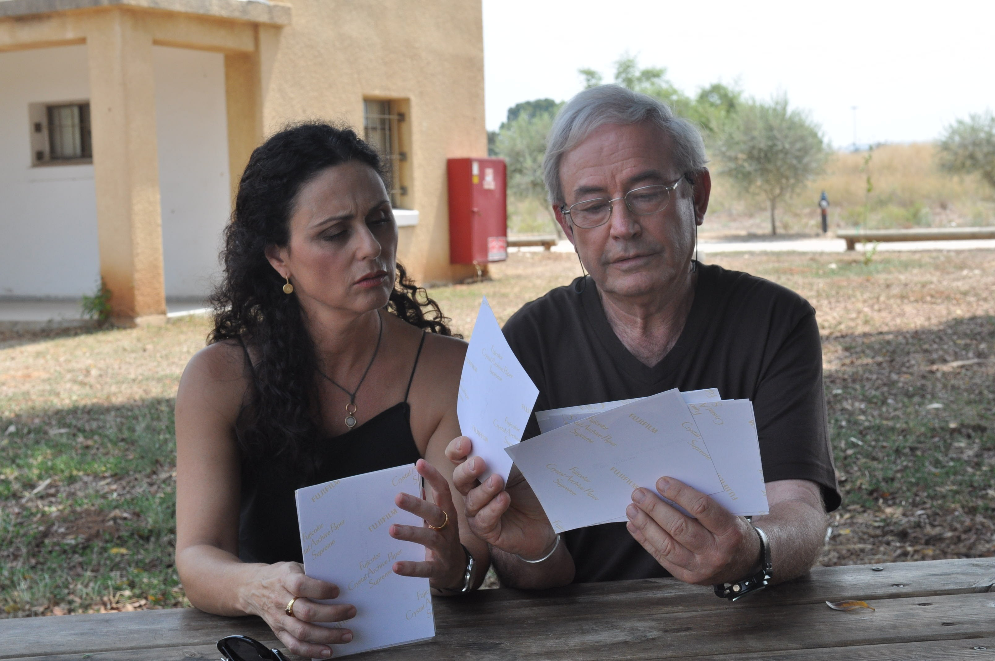 . משמאל, חנה אזולאי-הספרי, מתוך הסרט התיעודי "מבעד לעיניים – יוני המנחם"